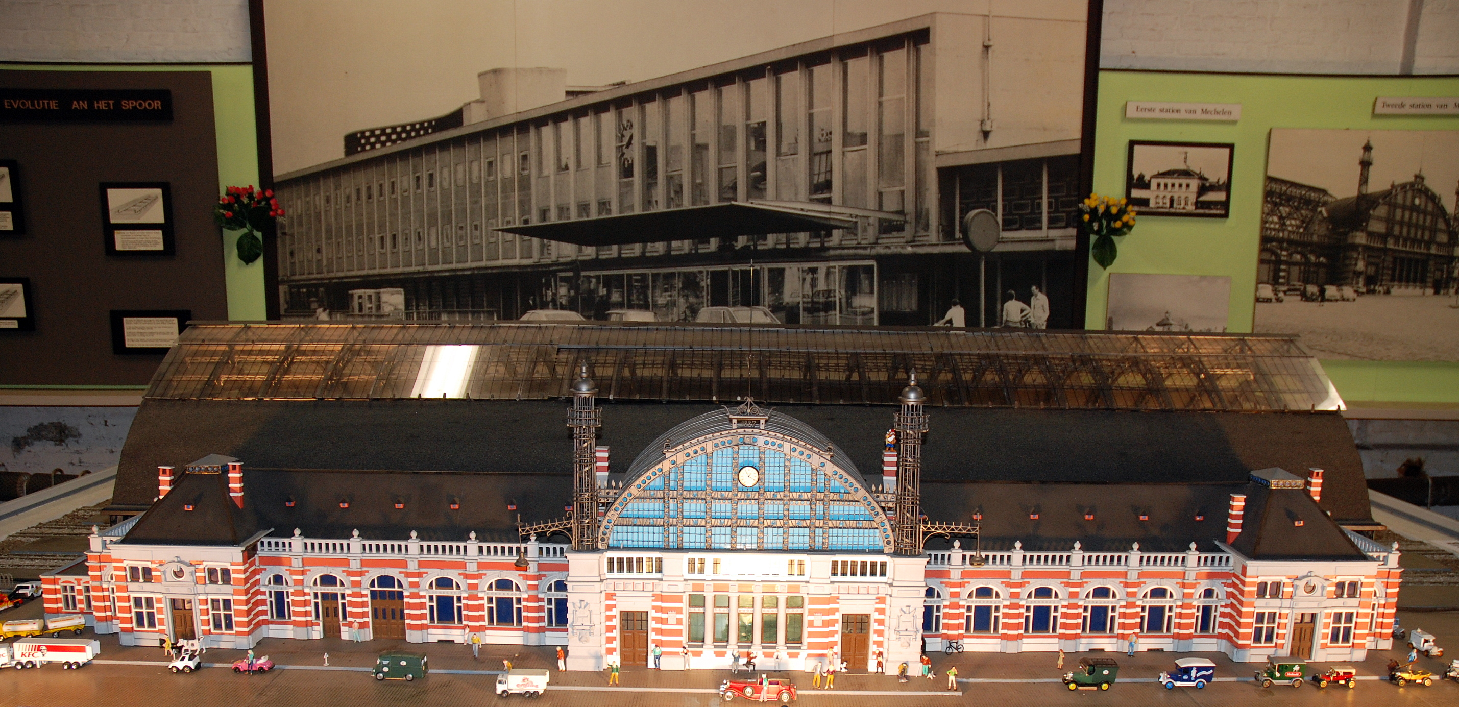 maquette van het spoorwegstation van Mechelen, België, gebouwd in 1888 en afgebroken in 1958-1960